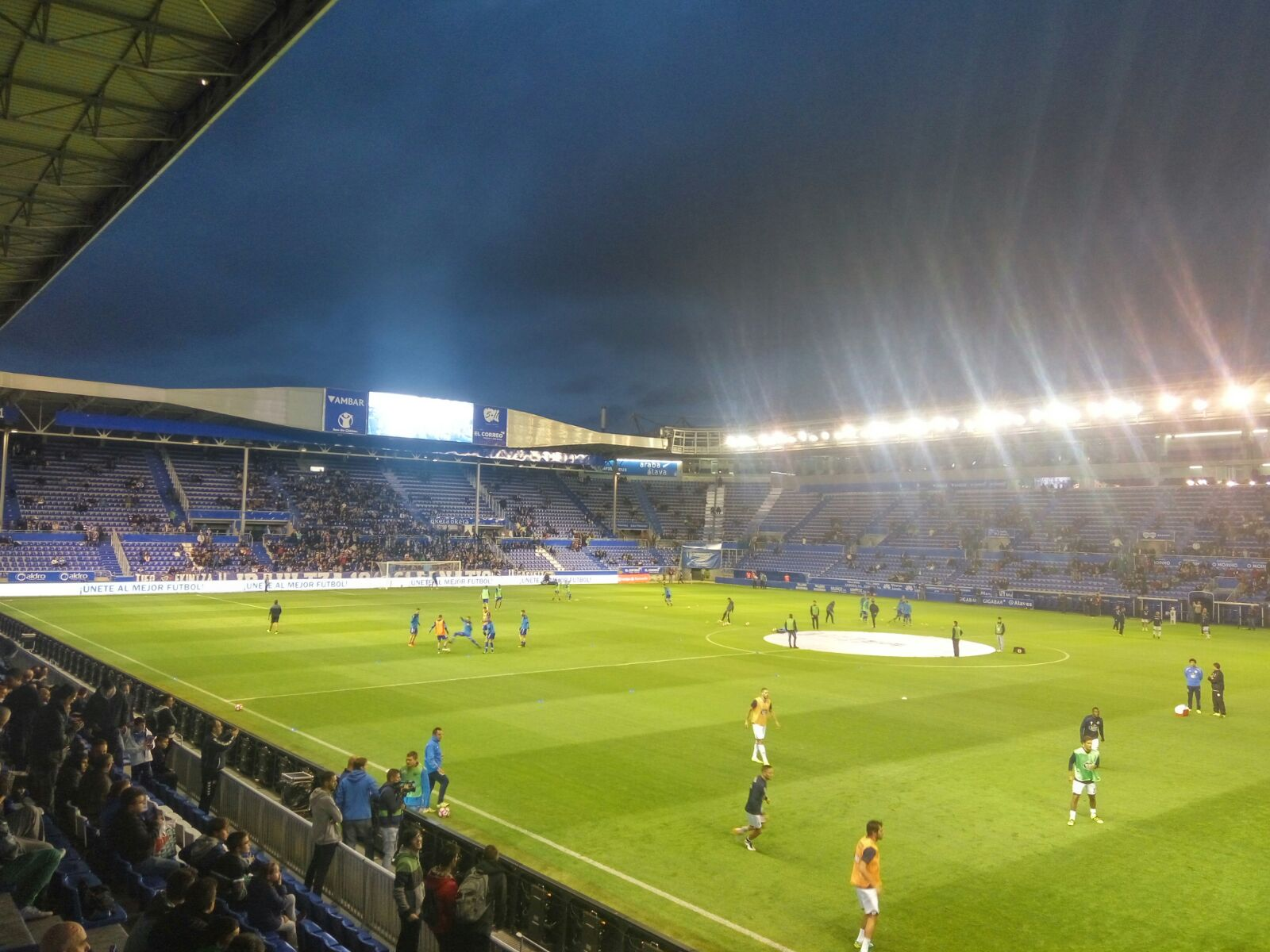 Imagen del estadio de Mendizorroza recién renovado, minutos antes de un Alavés-Deportivo